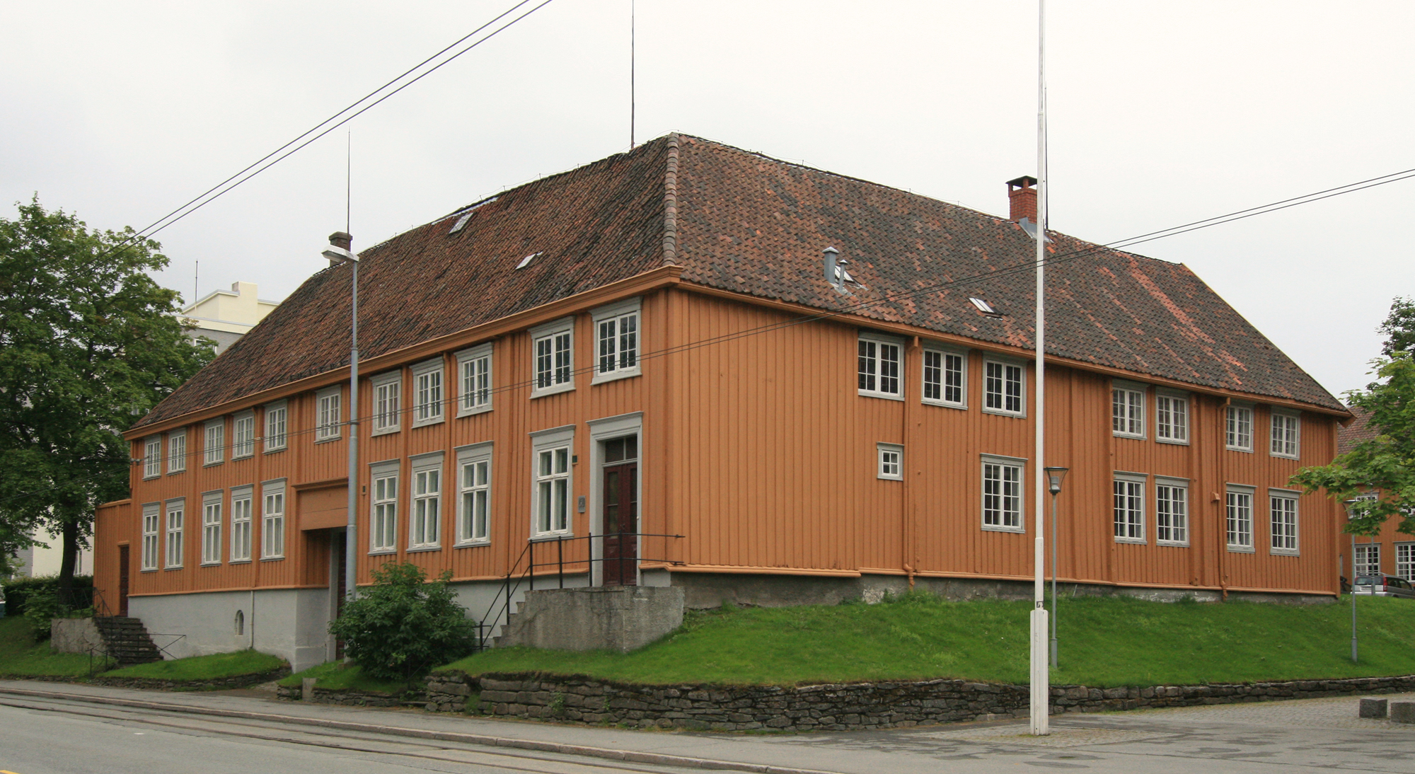 Tukthuset, Kongens gate 85, Trondheim. Bygd omkring midten av 1700-tallet. Ombygd til fengsel 1770; arkitekt Heinrich Kühnemann.